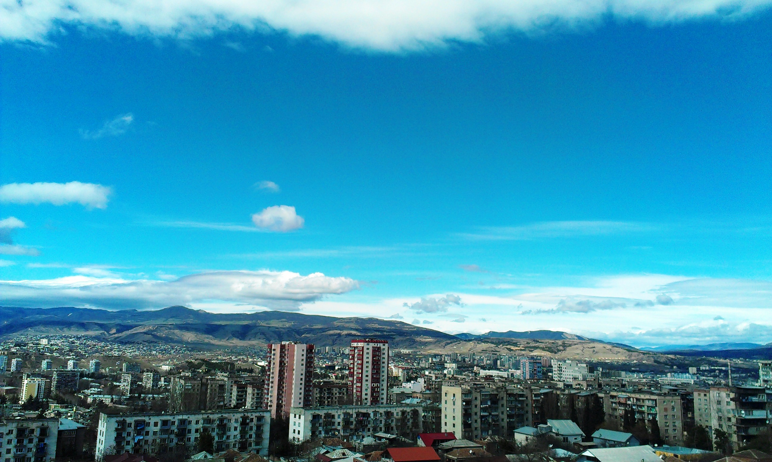 თბილისი, სანზონის ხედი ჩარგლის ქუჩიდან